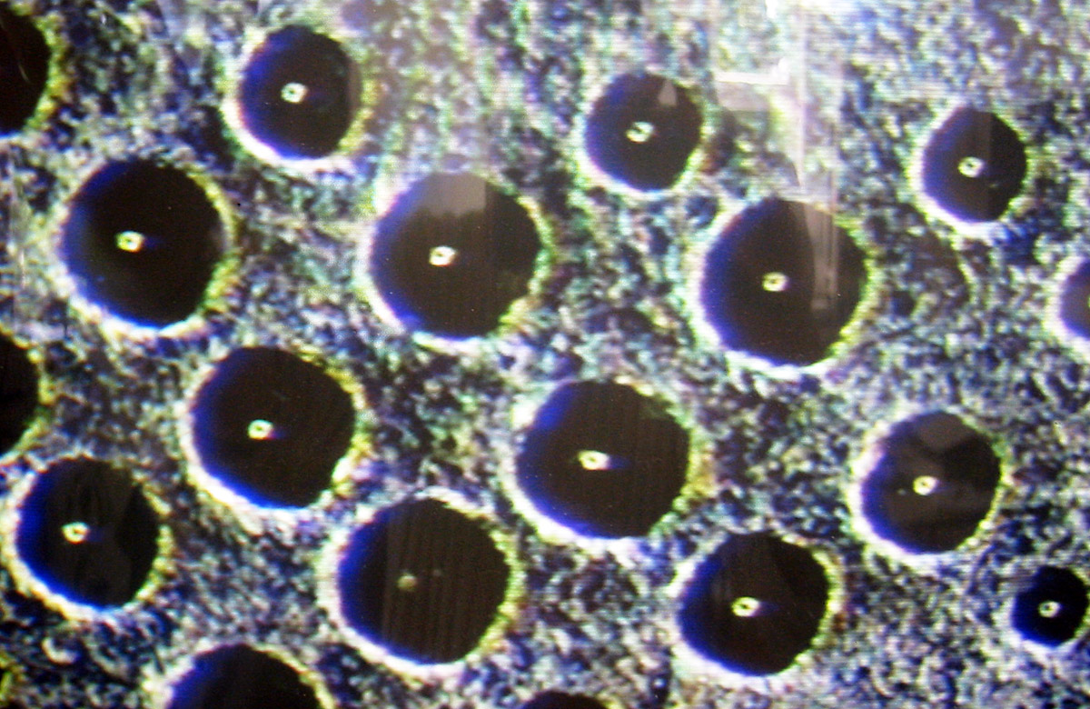 Fotogravur mit einem Diamanten, Vergrößerung unter einem Mikroskop, Material Messing glatt poliert